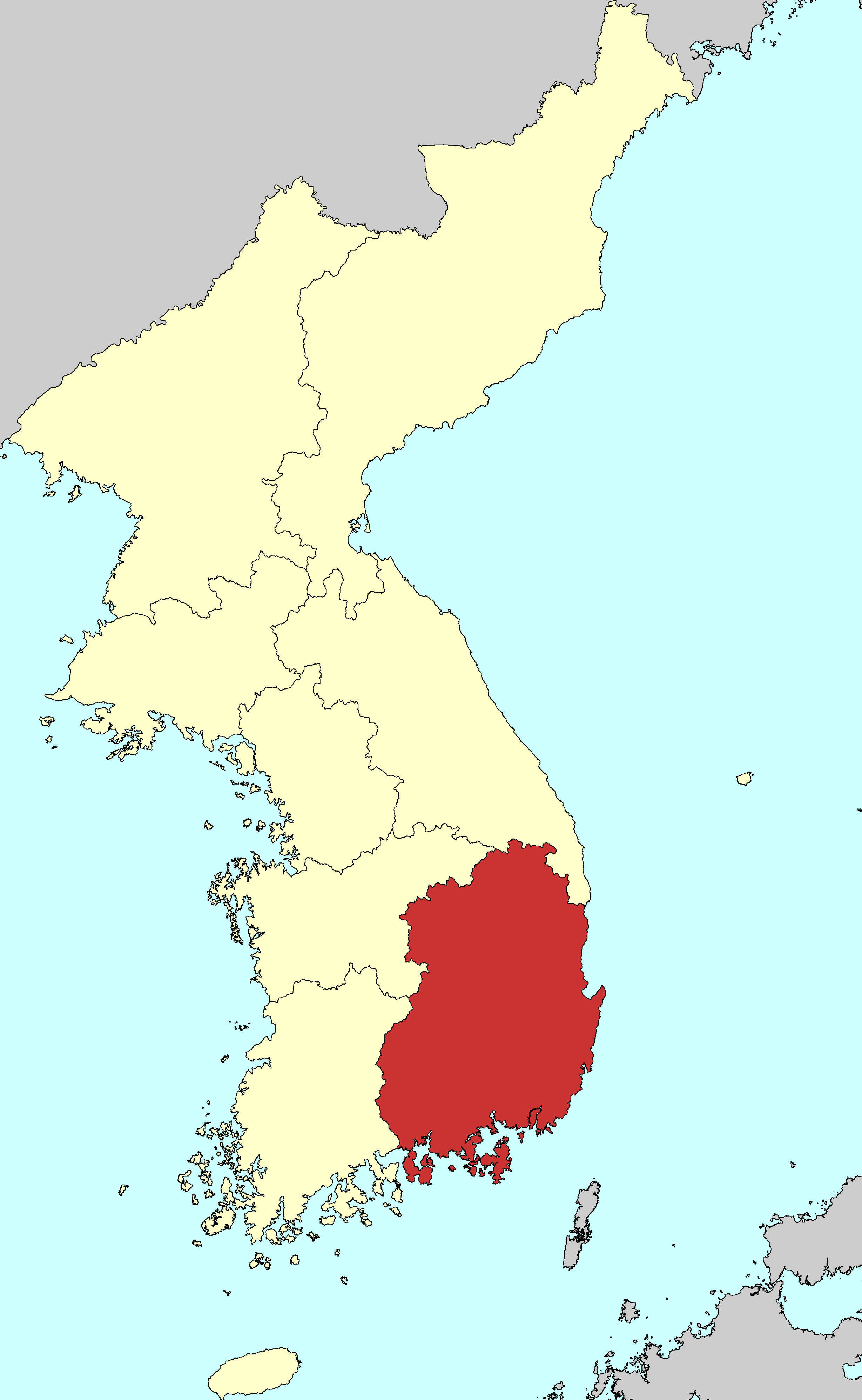 조선 후기 경상도